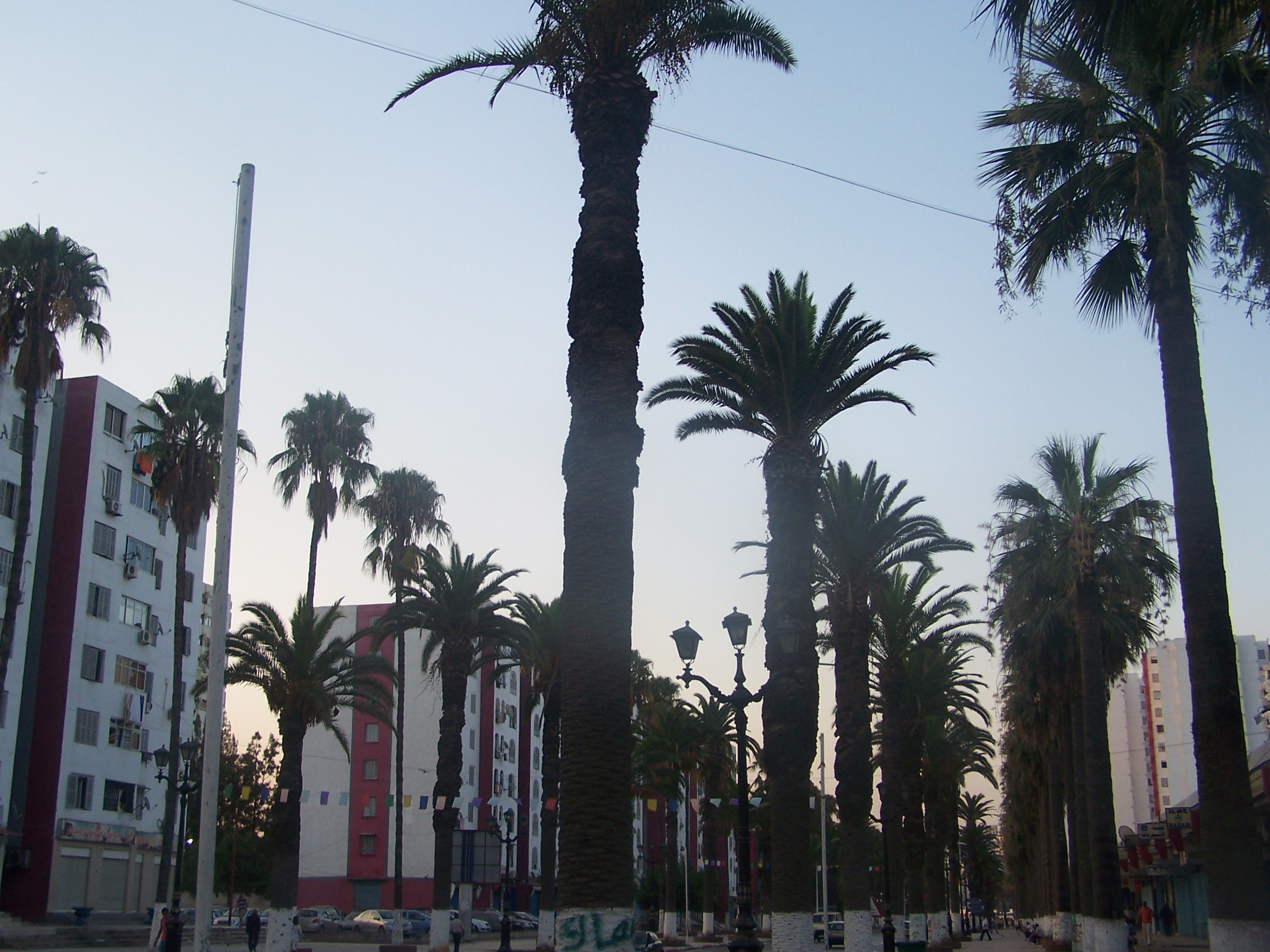 Des palmiers du grand boulevard du centre ville de Skikda (Algérie).